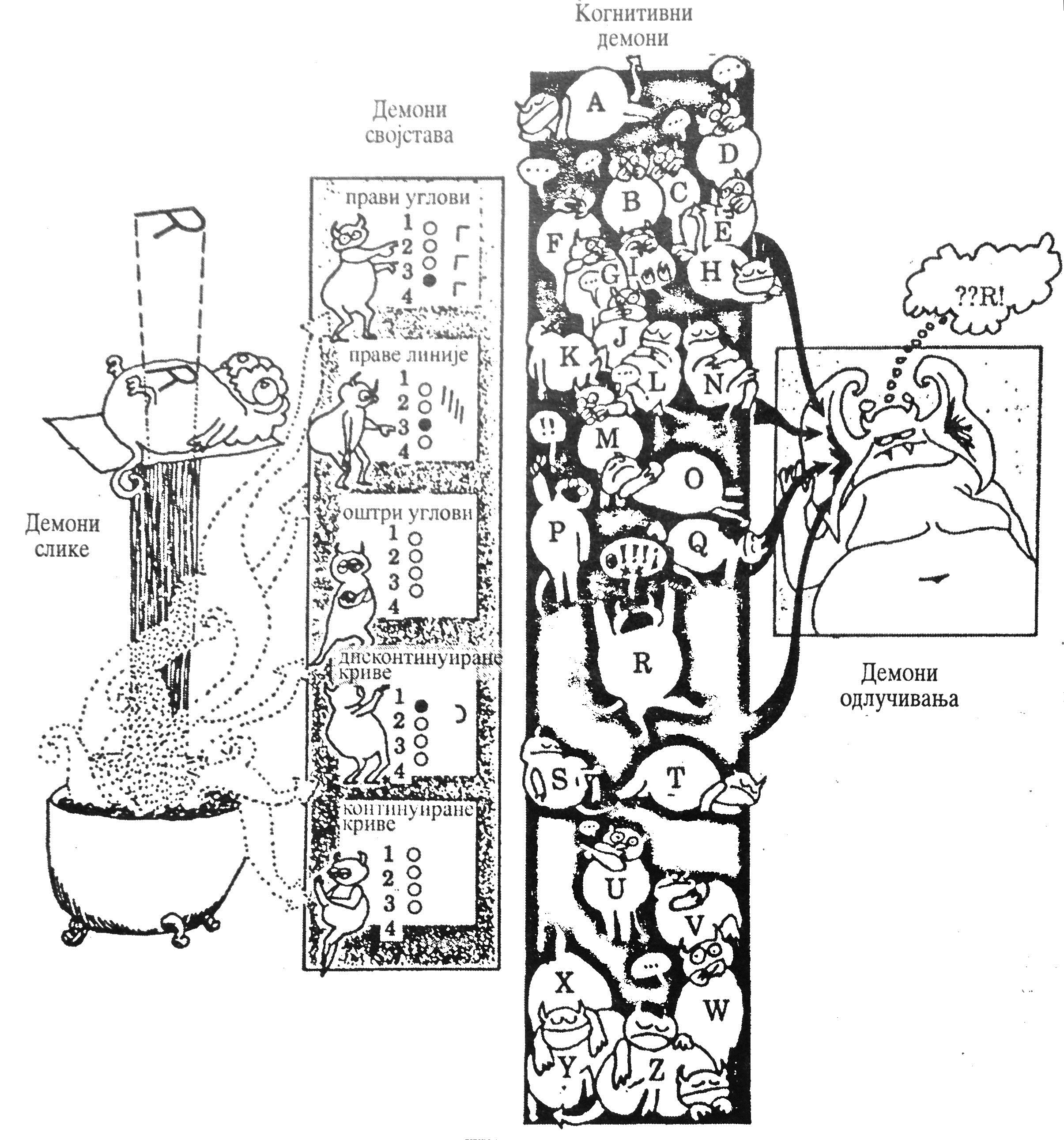 kognitnivni demoni